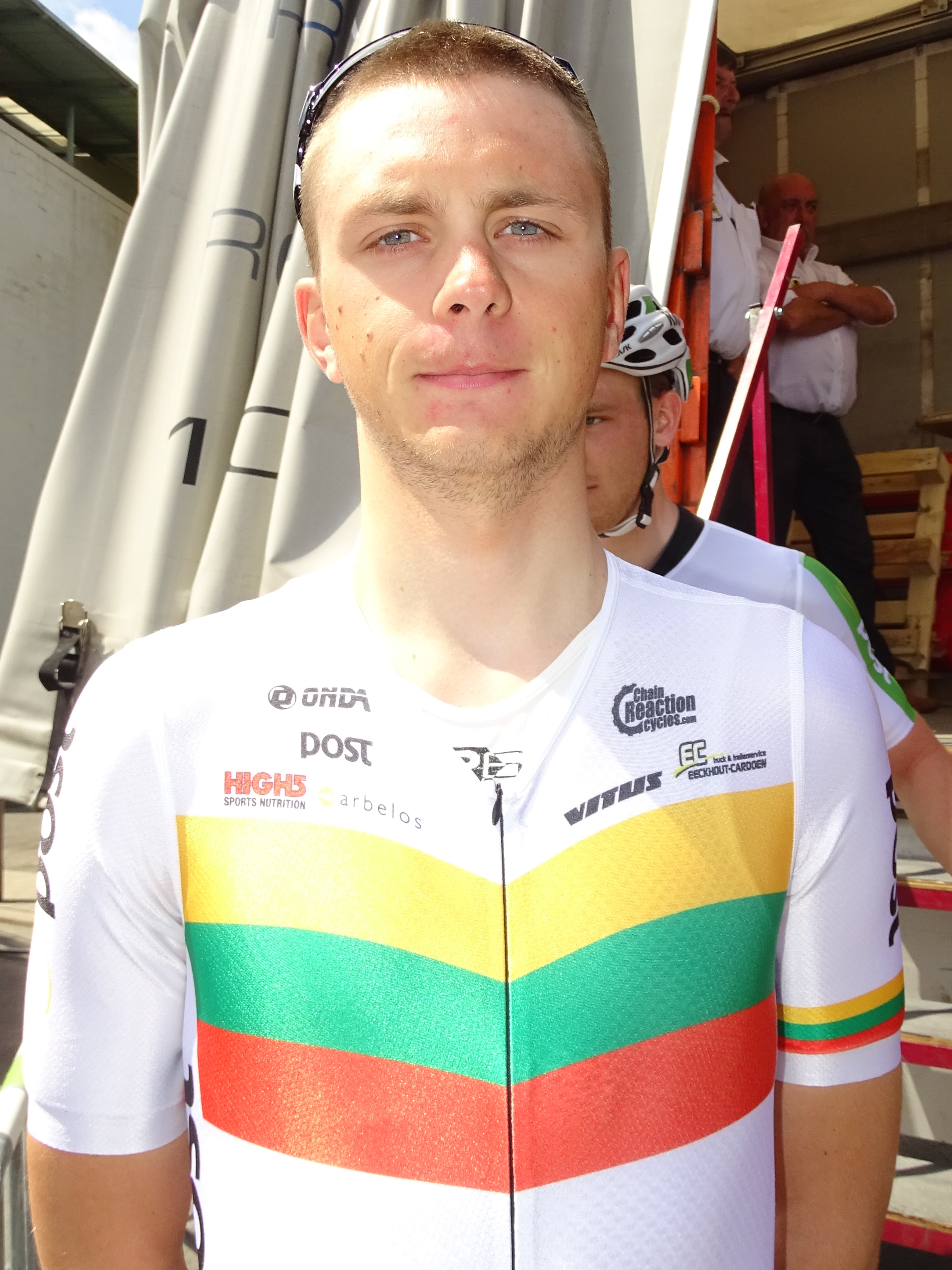 Reportage réalisé le dimanche 7 juin à l'occasion du départ du Mémorial Philippe Van Coningsloo 2015 à Wavre, Belgique.